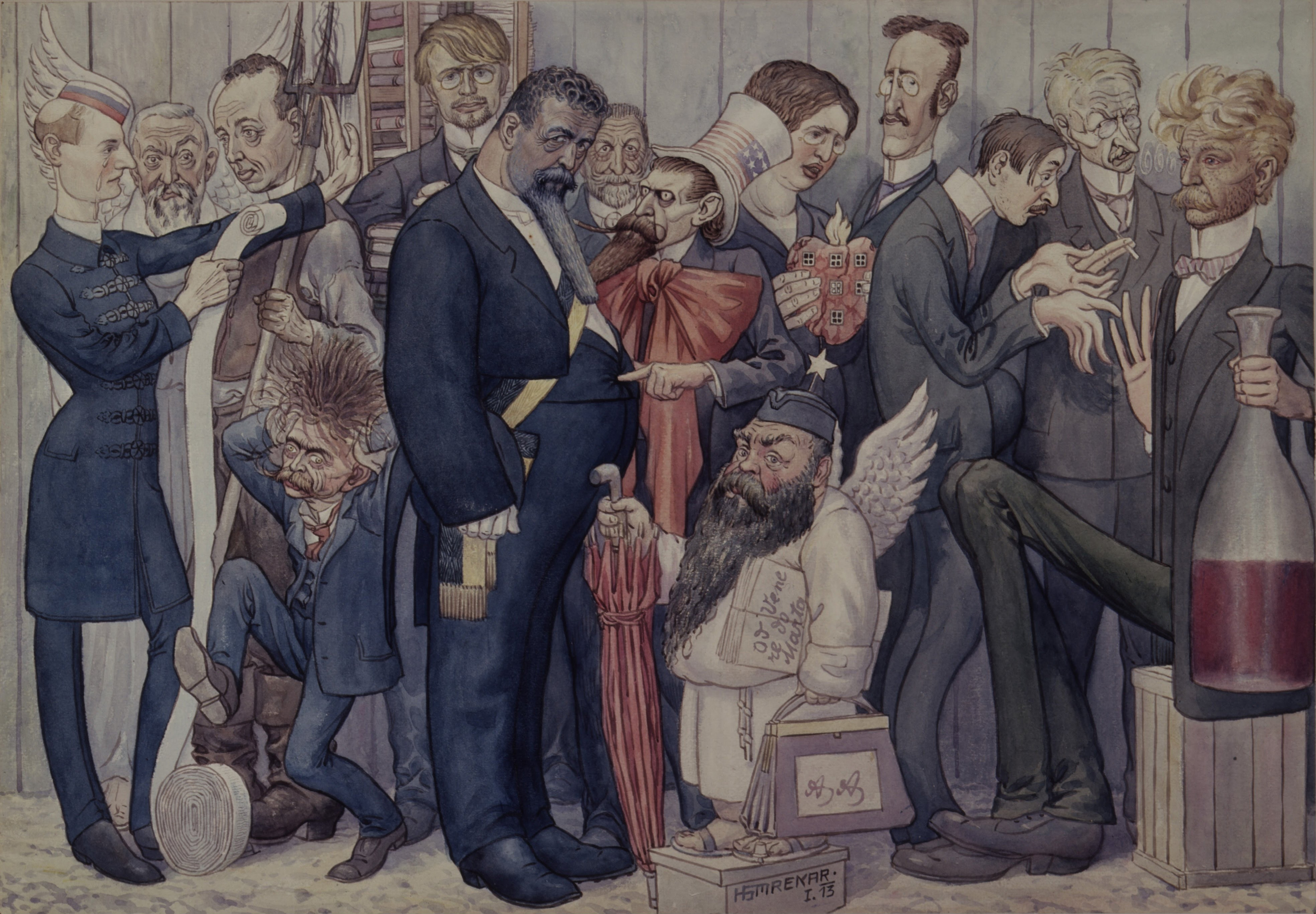 Slovenski literati: Franc Ksaver Meško, Janez Trdina, Fran Saleški Finžgar, Ivan Cankar, Vladimir Levstik, Ivan Tavčar, Fran Levec, Etbin Kristan, Anton Aškerc, Zofka Kveder, Fran Govekar, Milan Pugelj, Oton Župančič in Cvetko Golar